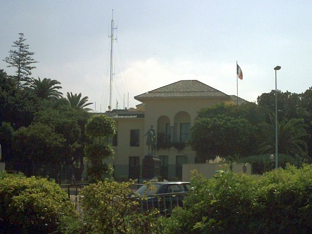 Reiterstandbild des Marschalls Hubert Lyautey im Vorgarten des Konsulats der Französischen Republik in Casablanca, Marokko